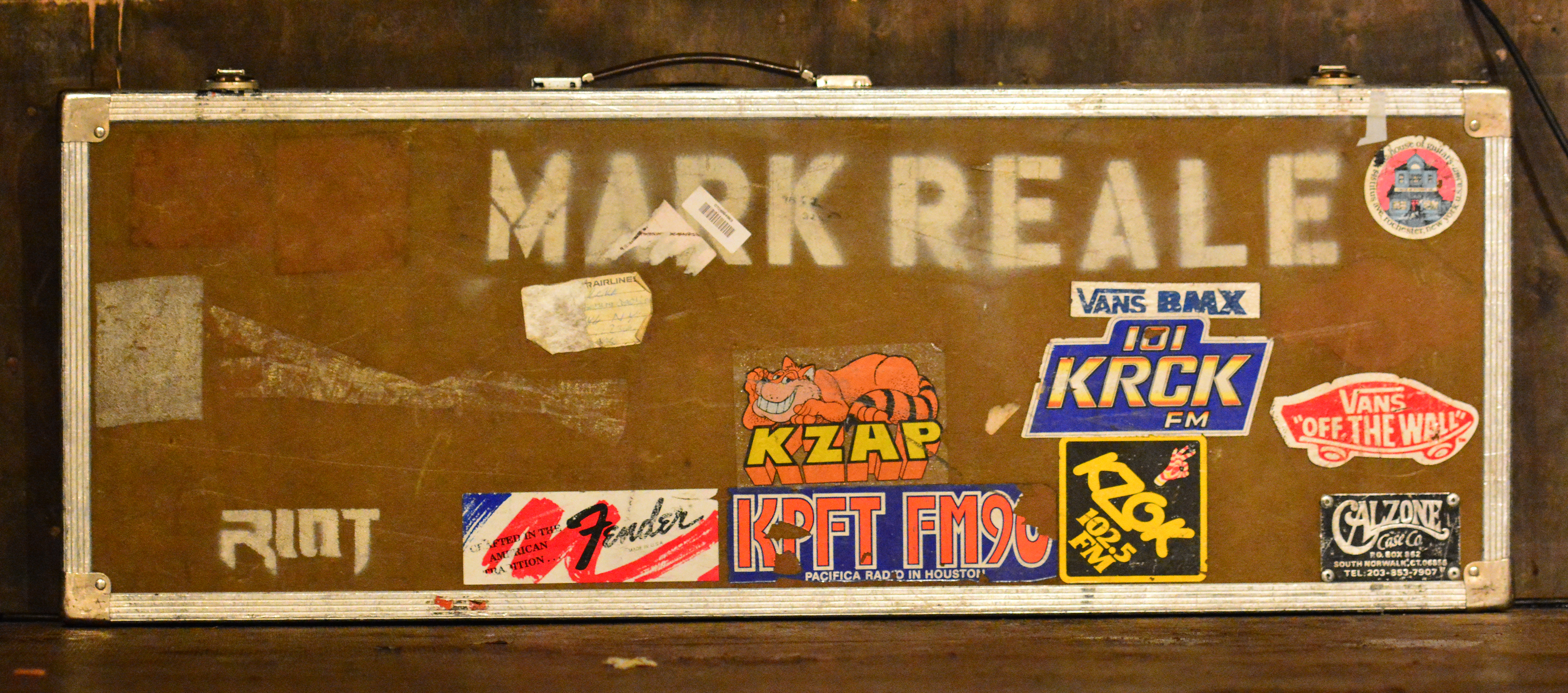 Gitarrenkoffer von Mark Reale auf der Bühne beim Auftritt von Riot V beim Headbangers Open Air 2014